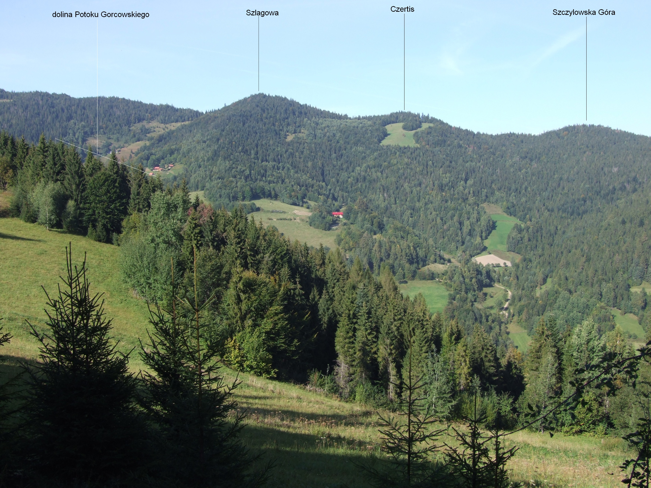 Widok na grzbiet Strzelowskie w Ochotnicy Dolnej